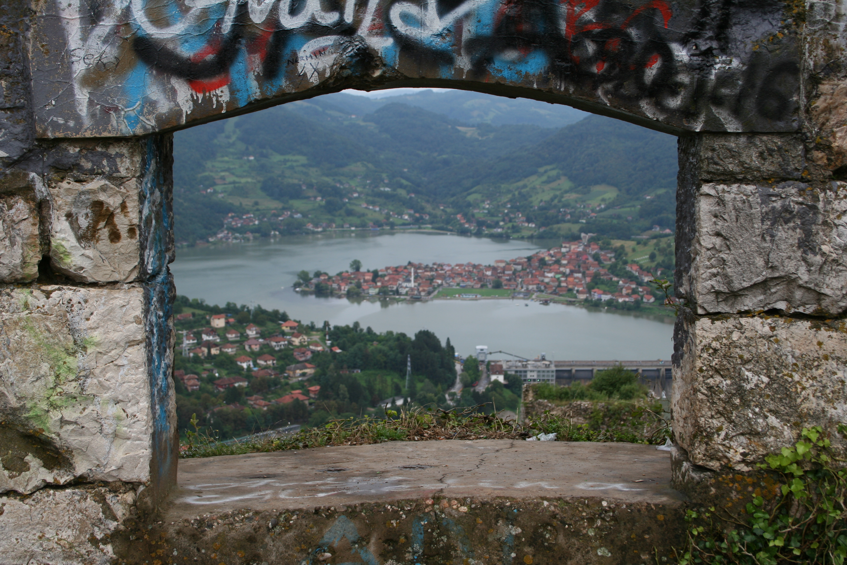 Pogled na Mali Zvornik sa Kule grada u Zvorniku, Republika Srpska